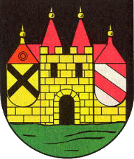 Wappen der Stadt Elterlein